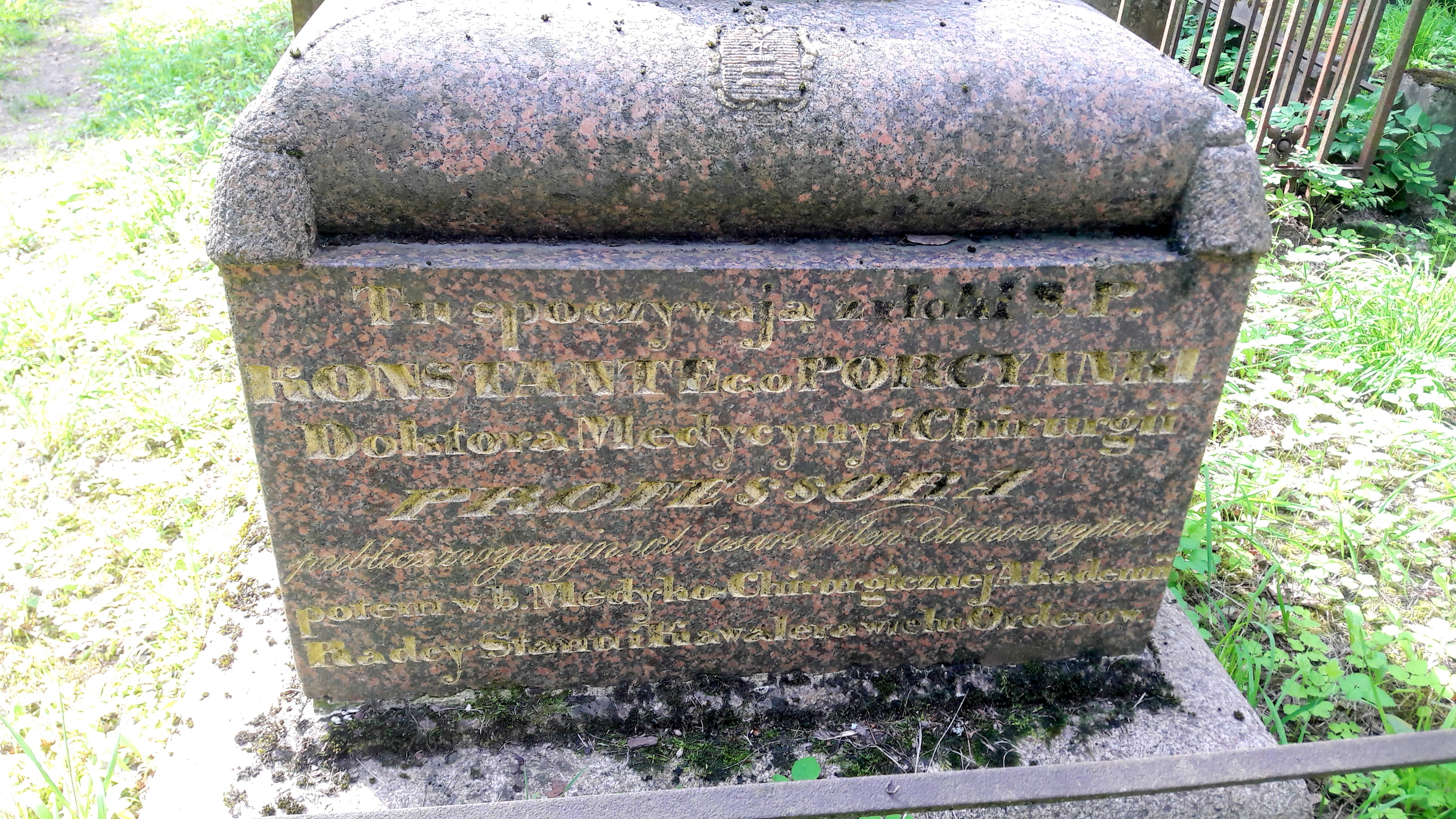 Konstantino Porcijankos antkapis Vilniaus Bernardinų kapinėse